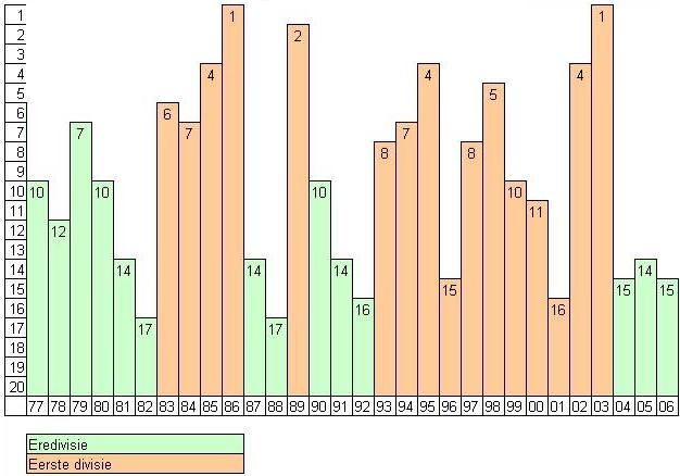 Ranglijstposities ADO Den Haag. Jaartallen 1977 - 2006